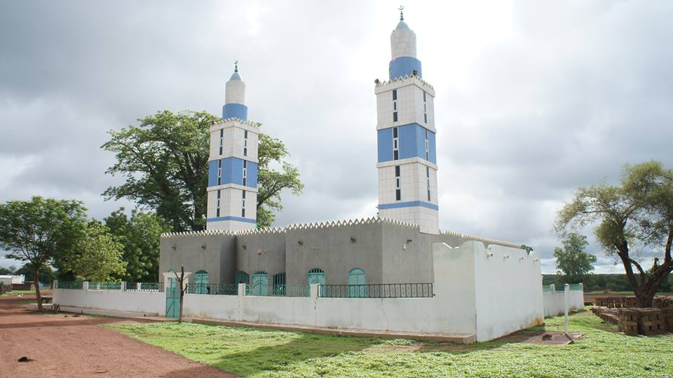 La mosquée de Dieylani, l'une des plus belle mosquées du Boundou, elle a été financée par diaspora et inaugurée en 2009